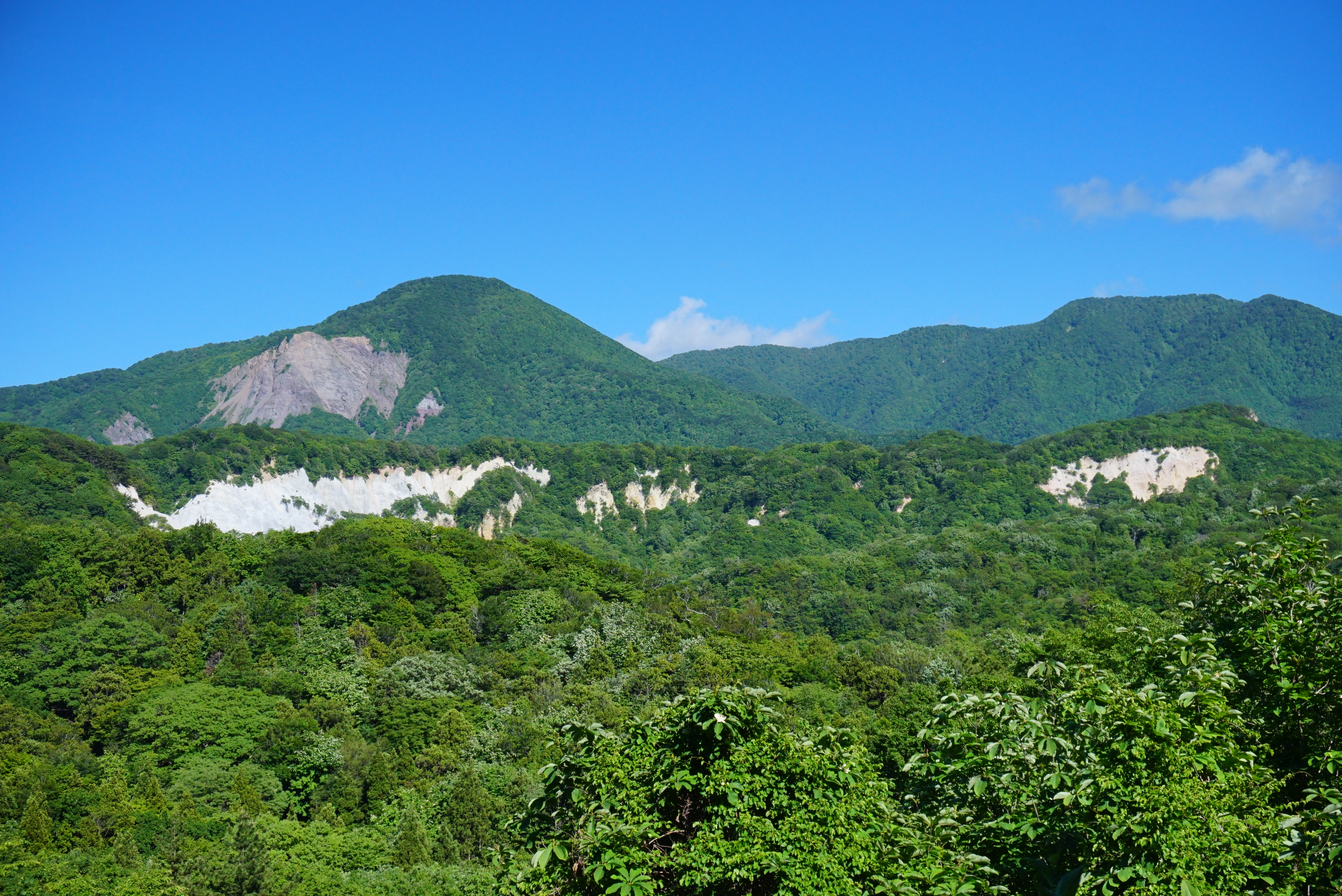 日本キャニオン（青森県西津軽郡深浦町）。浸食崩壊によって凝灰岩の白い岩肌が露わになっている。